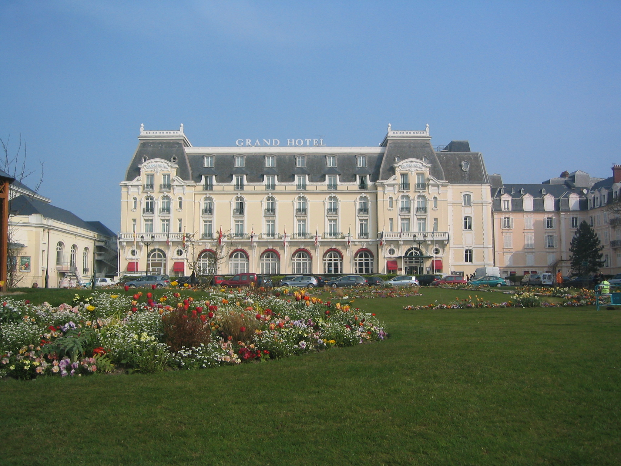 Le grand hôtel de Cabourg (Calvados, France) où séjourna Marcel Proust.